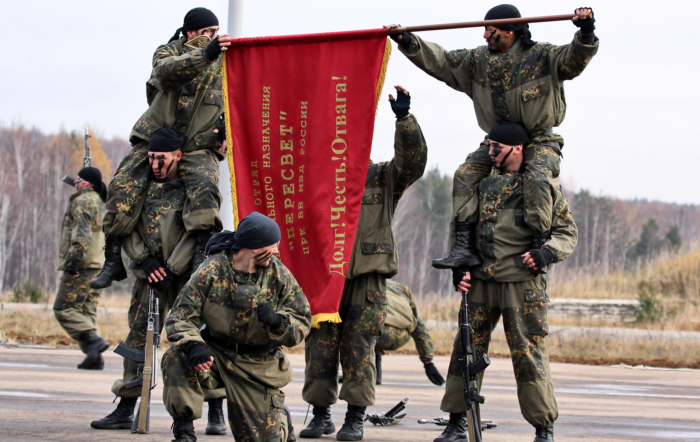 Показательное выступление 33-го отряда специального назначения Пересвет ЦРК ВВ МВД России. (Internal troops Central regional command 33rd Special purpose unit Peresvet - 33 OSpN Peresvet performed a show for the visitors)